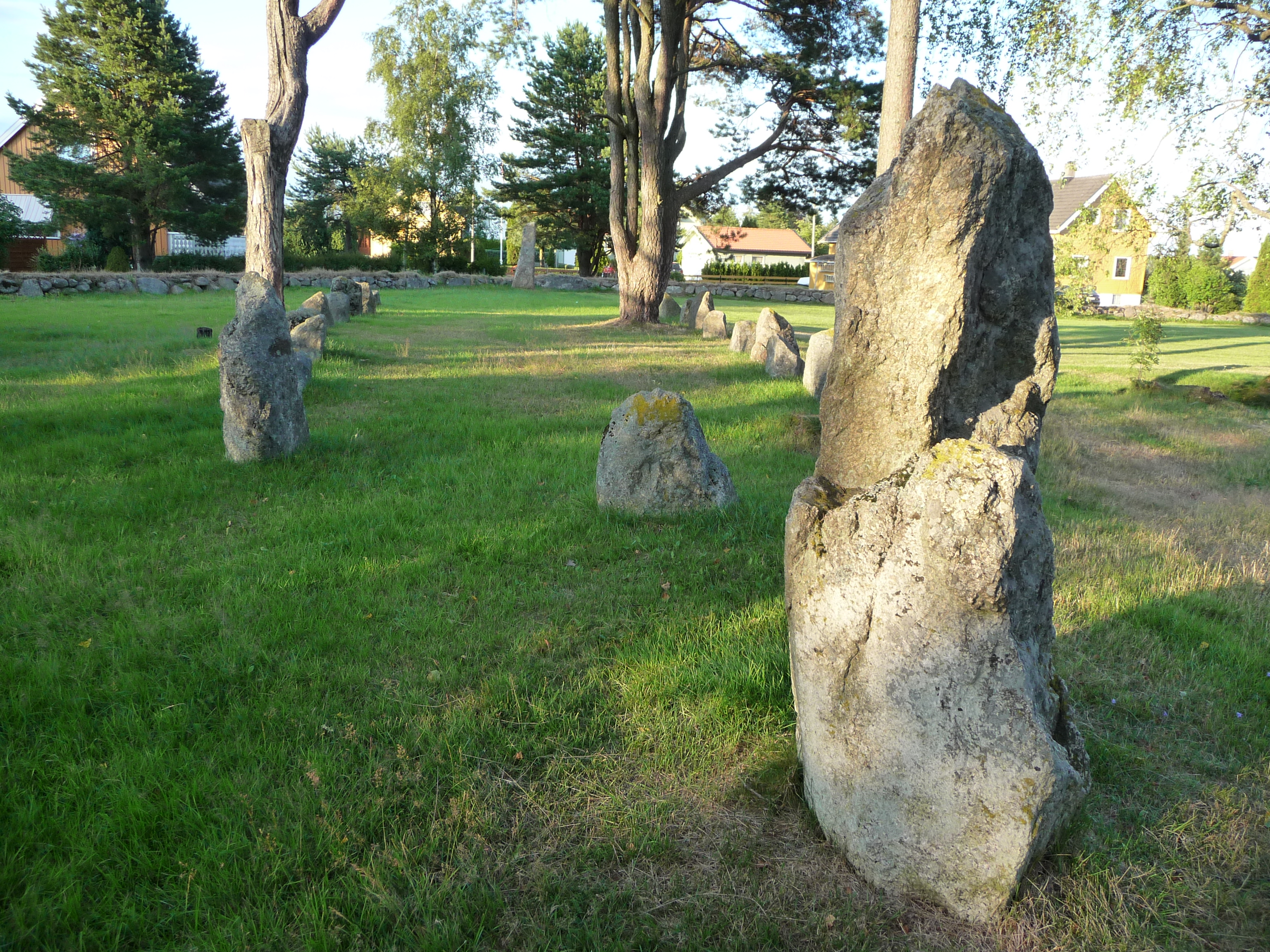 Steinsetting på Elgesem